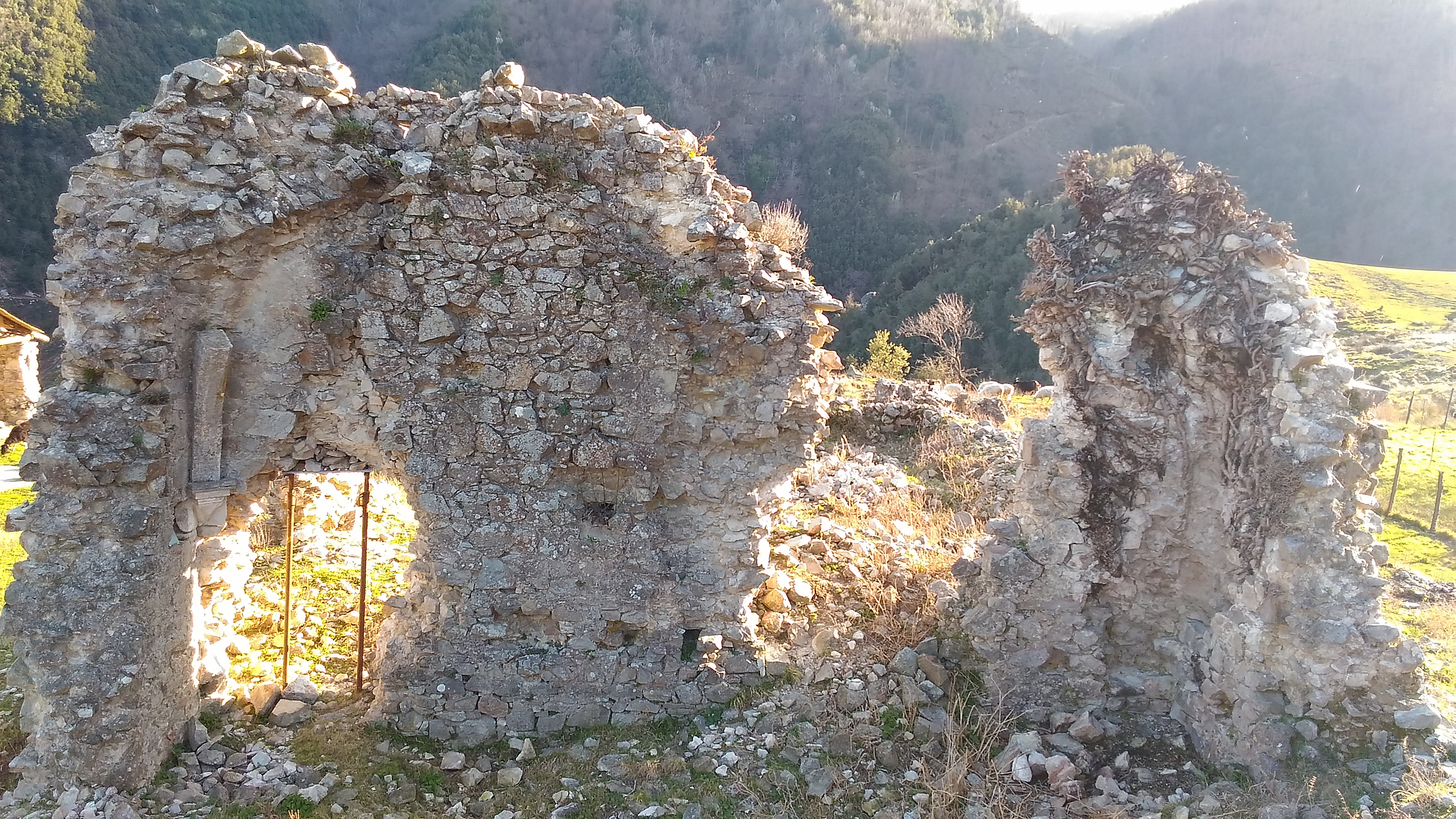 ruderi chiesa